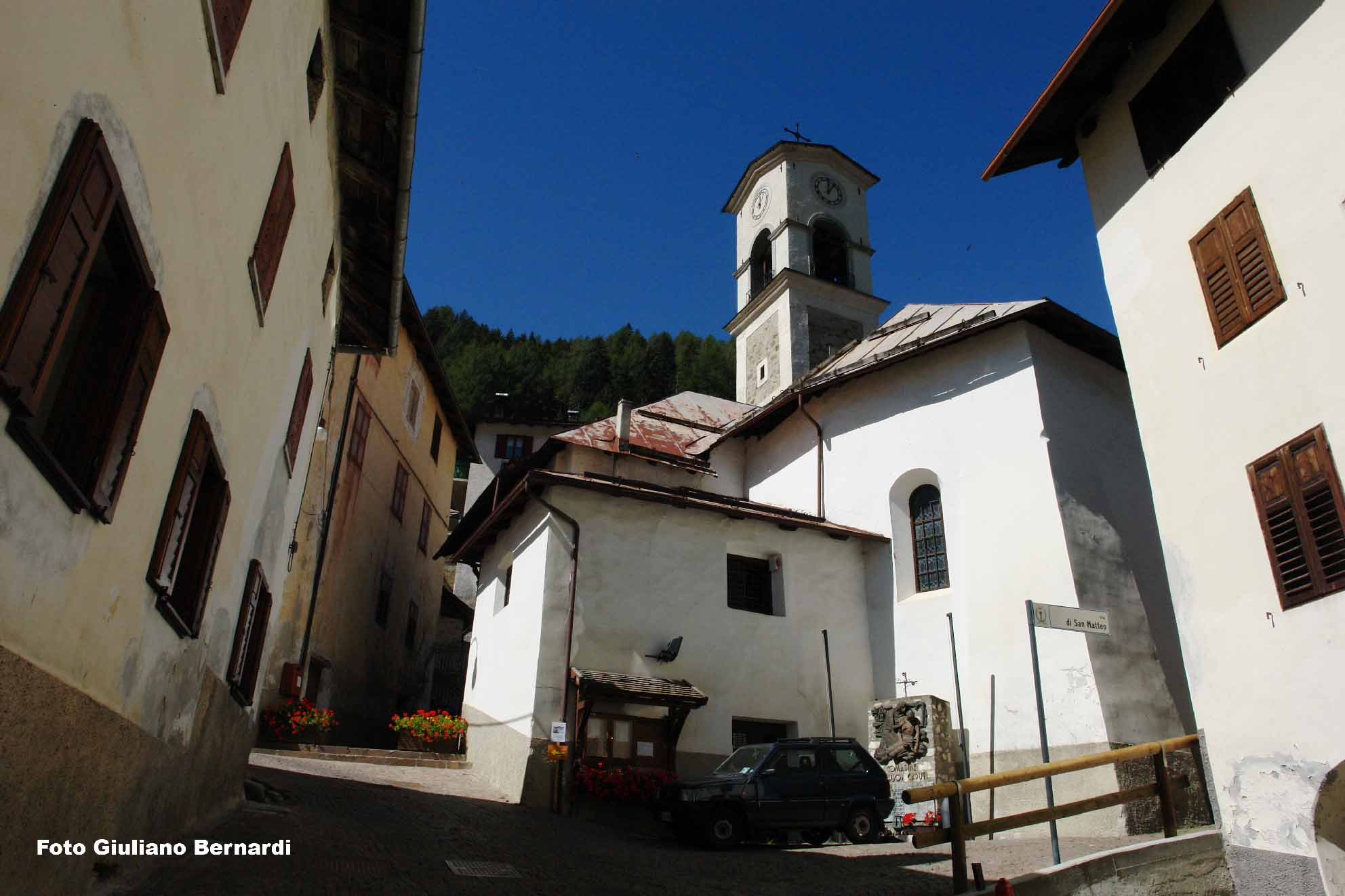 Foto di Giuliano Bernardi Comasine in Val di Pejo Trentino ,licenza GFDL e Creative Commons CC-BY-2,5,sono l'autore